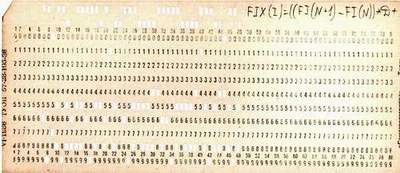 Перфокарта